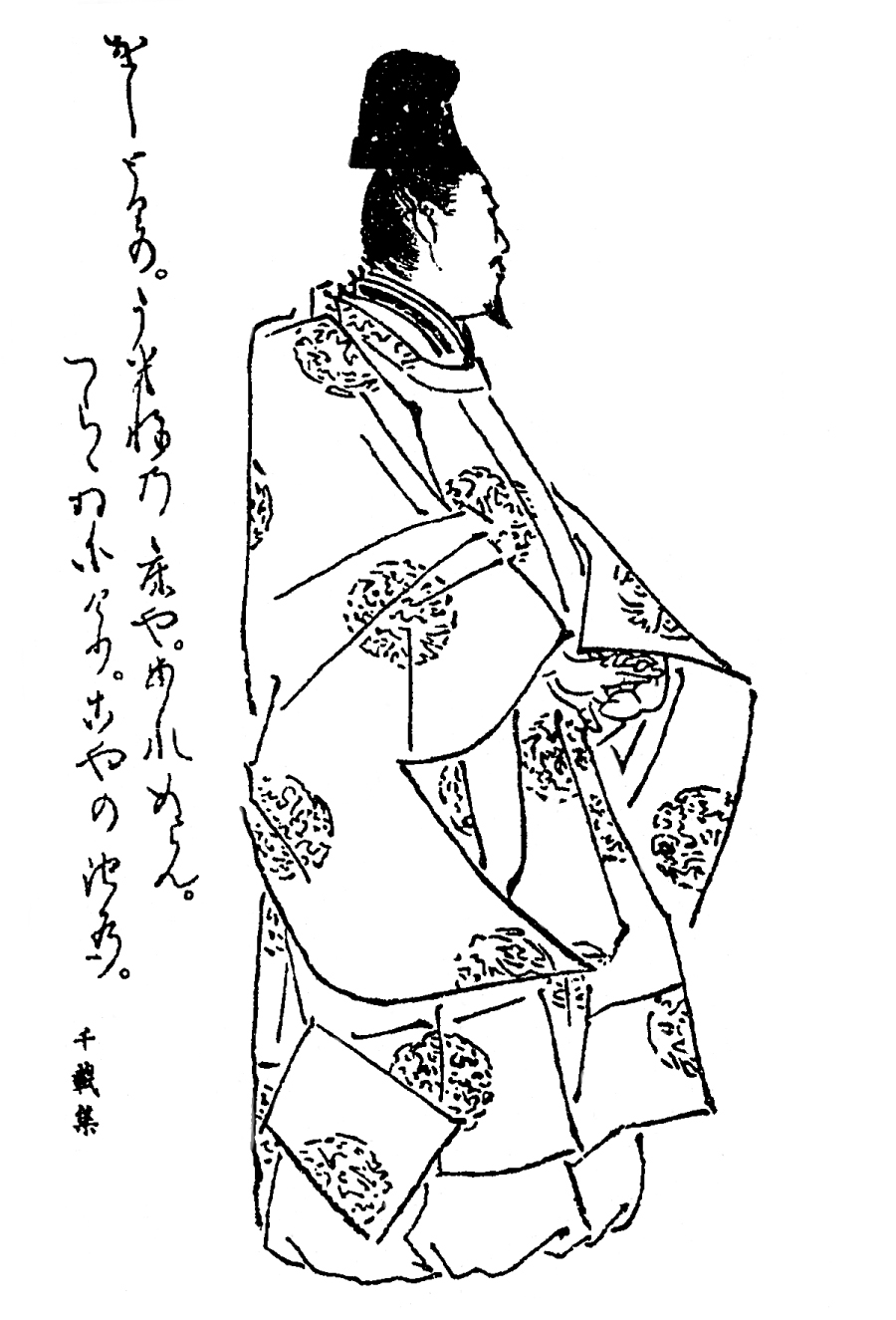 吉田経房（藤原経房）。平安時代末期 - 鎌倉時最初期の公家。／江戸時代『前賢故実』より。画：菊池容斎